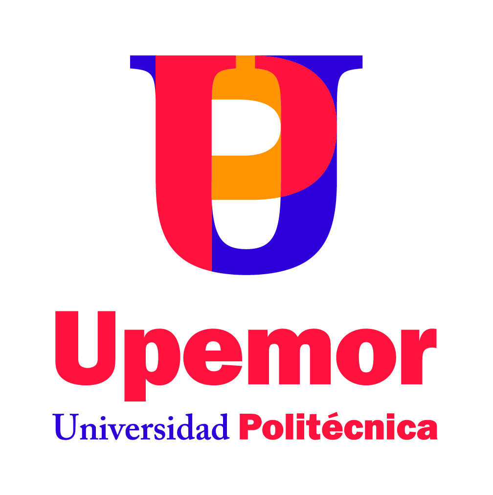 Logotipo Oficial de la Universidad Politécnica del Estado de Morelos (UPEMOR)